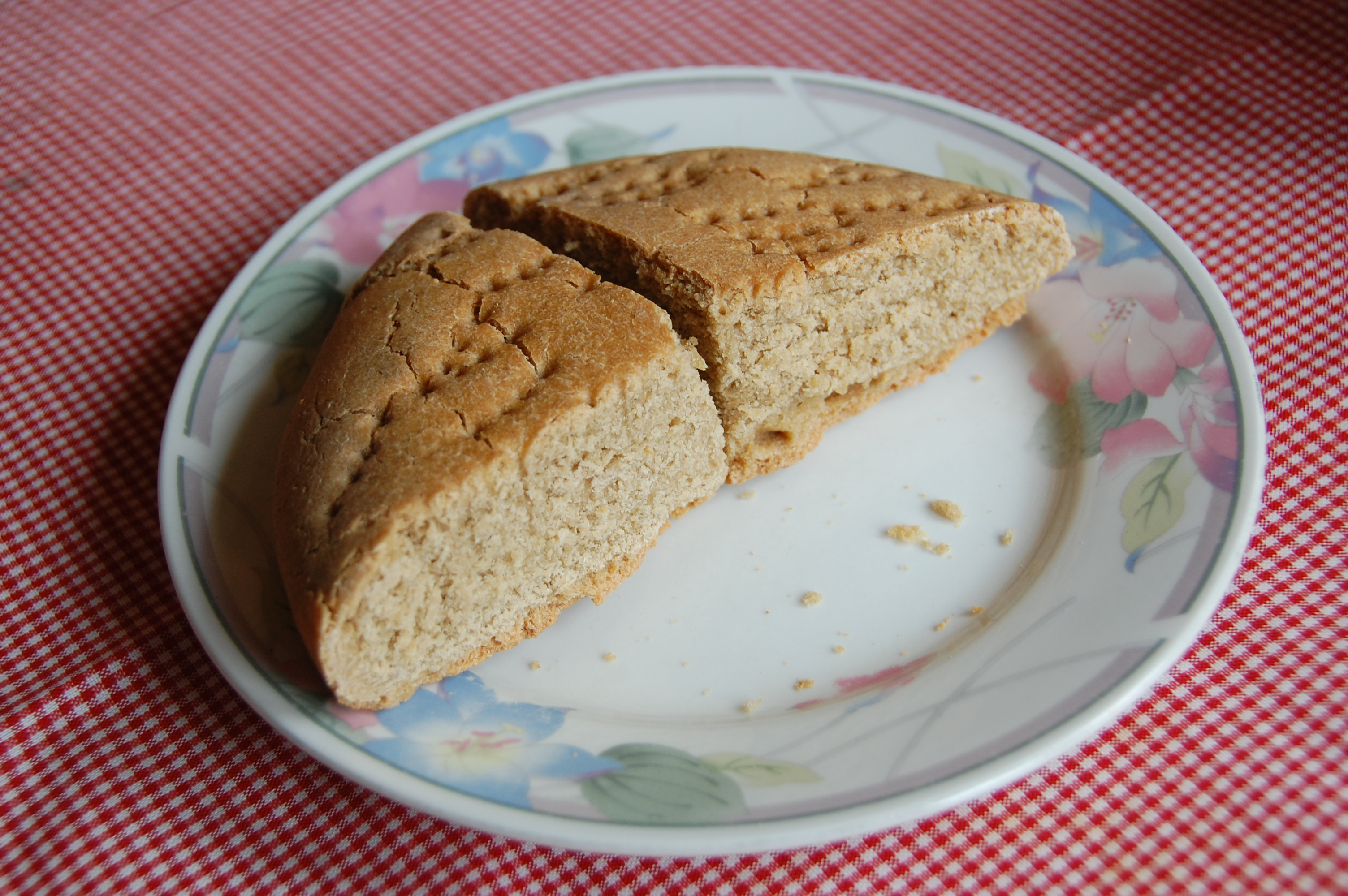 hunza bread